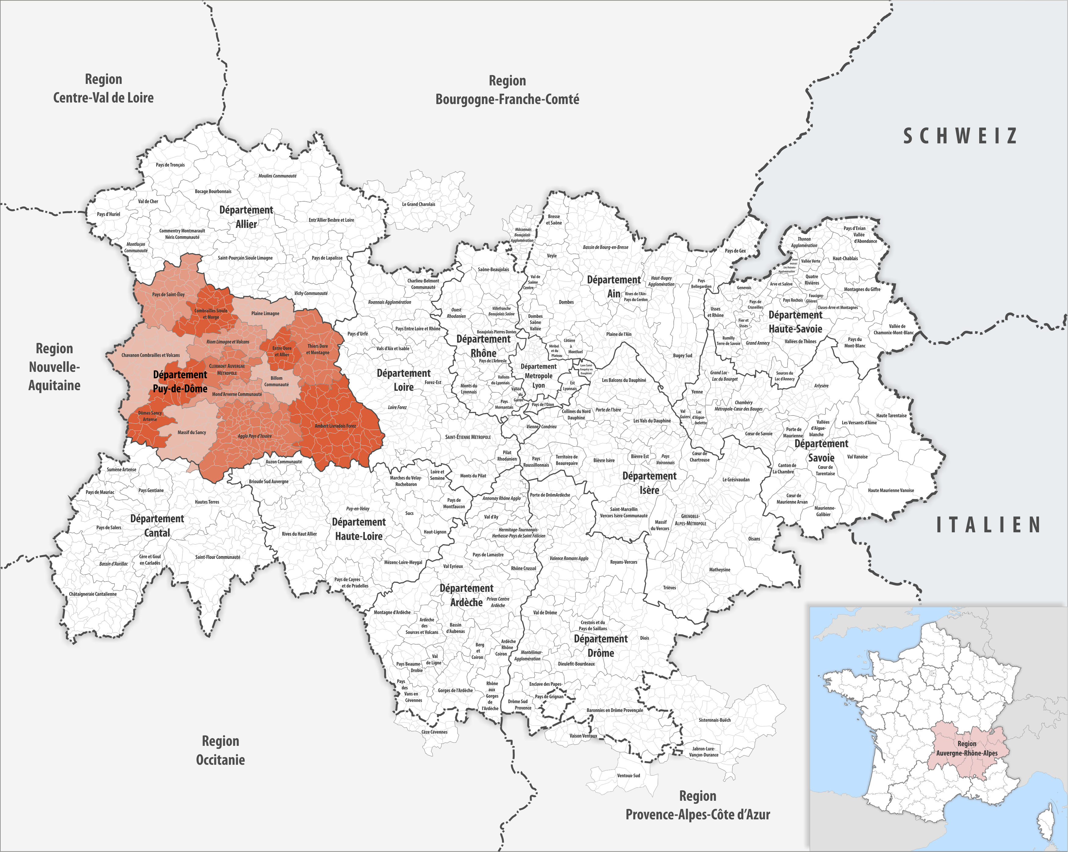 Gemeindeverbände im Département Puy-de-Dôme